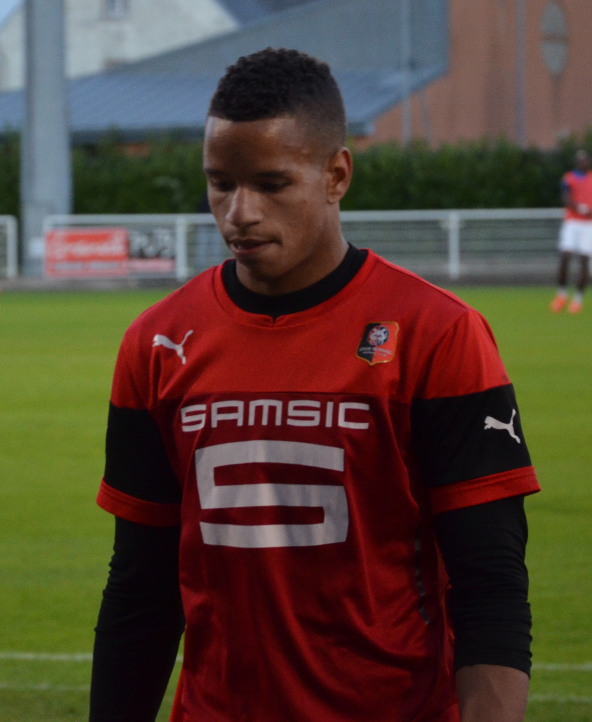 Photographie prise avant la rencontre de CFA2 opposant l'US Granville à la réserve du Stade rennais. Ici, le gardien Christopher Dilo.